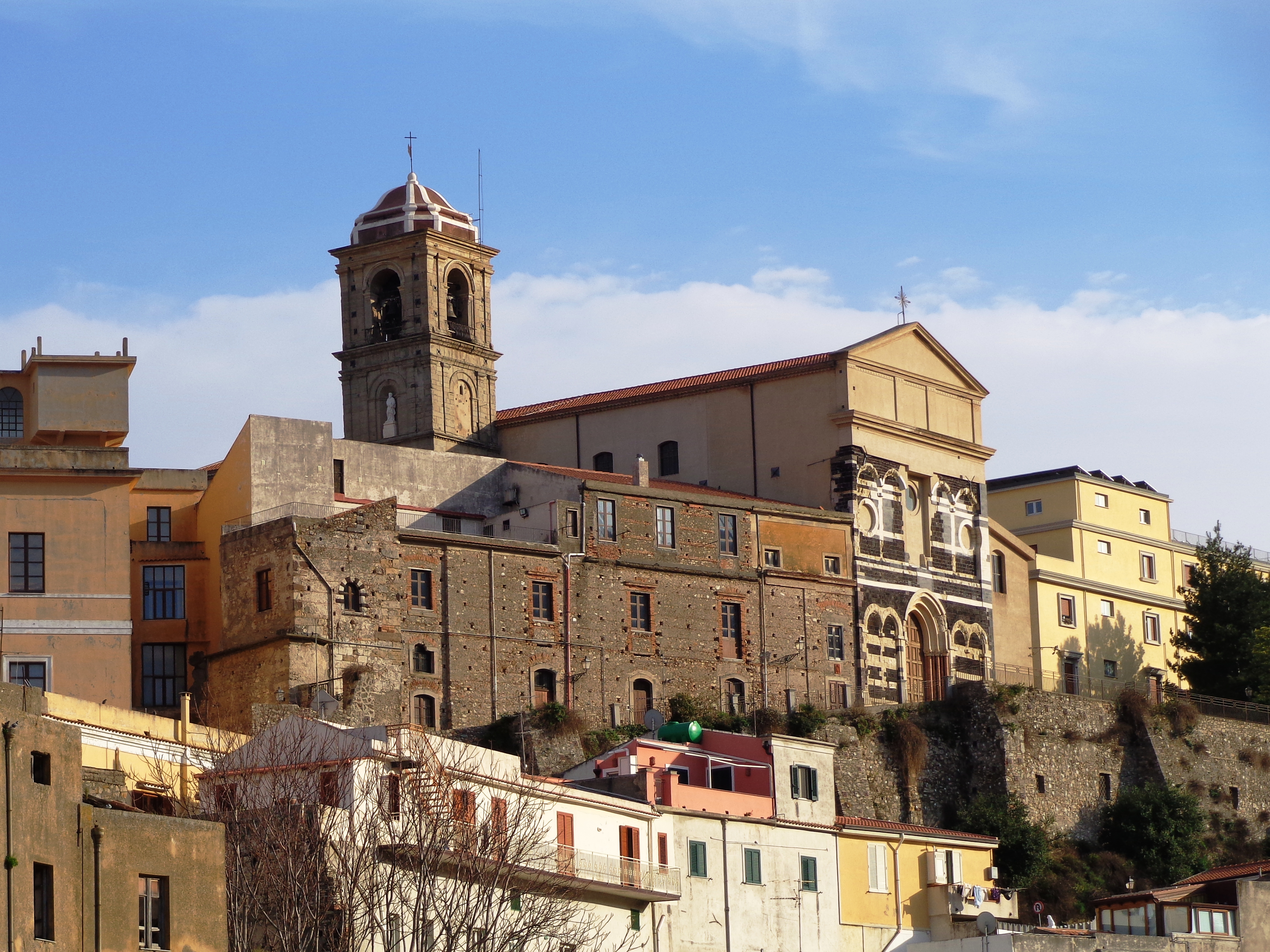 Cattedrale Patti 05